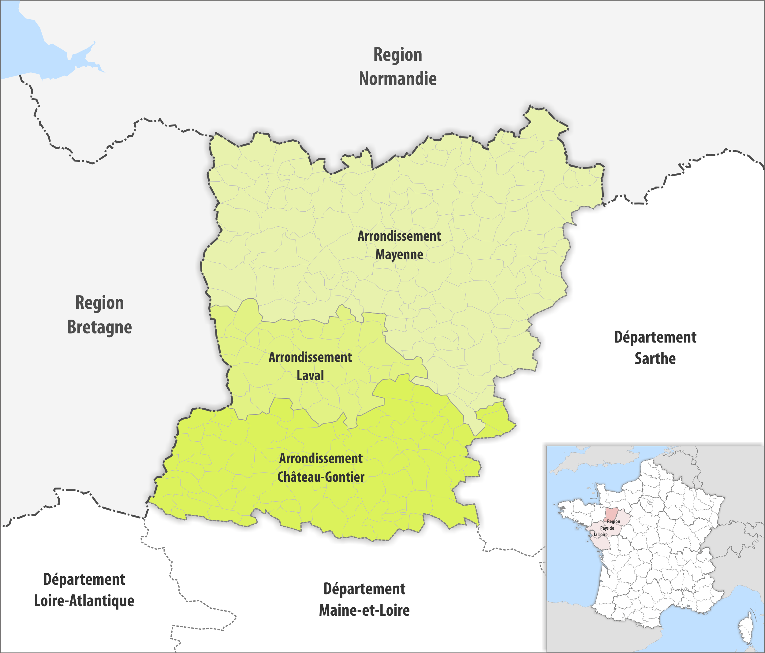 Gemeinden und Arrondissemente im Departement Mayenne